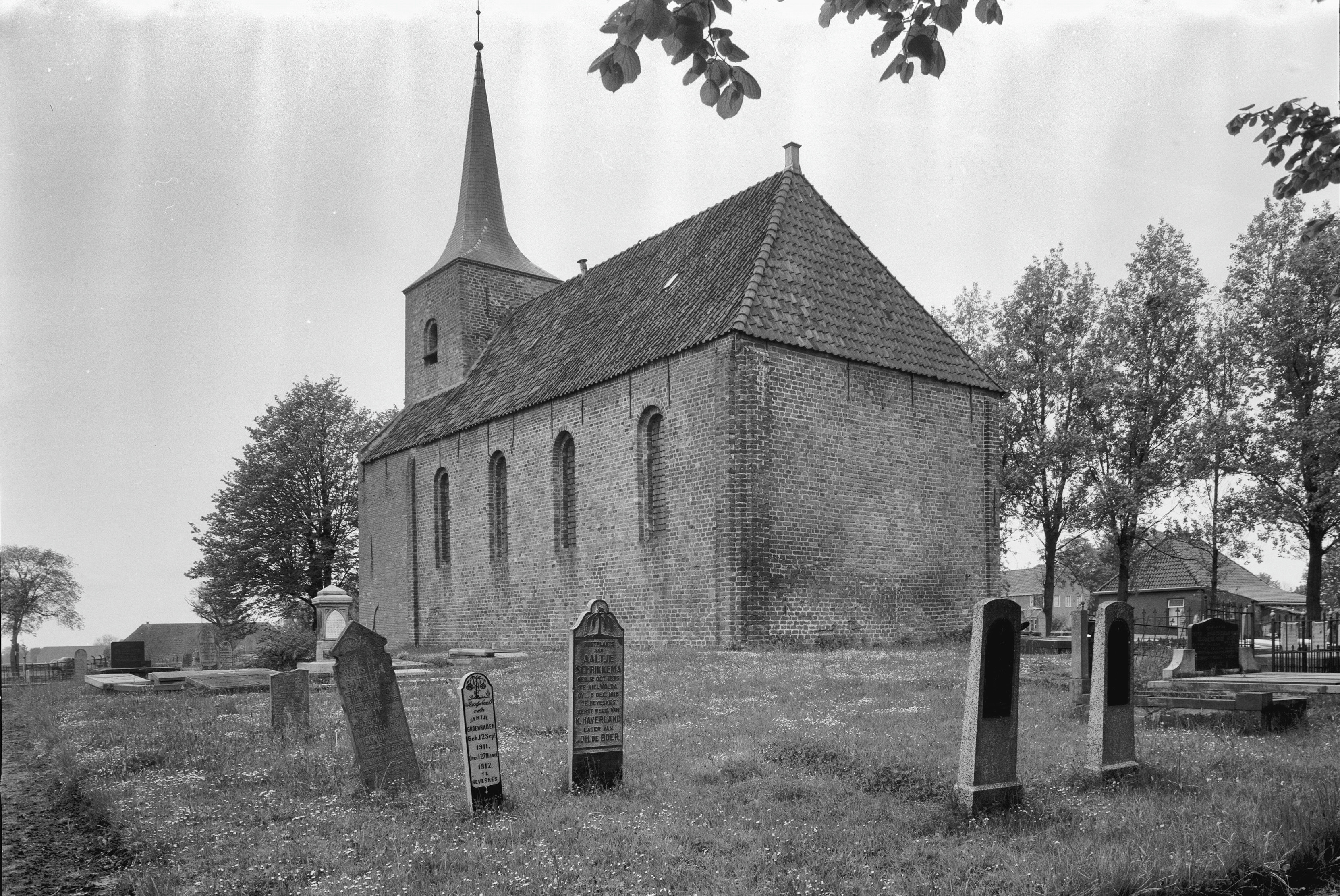 N.H.Kerk: exterieur achter